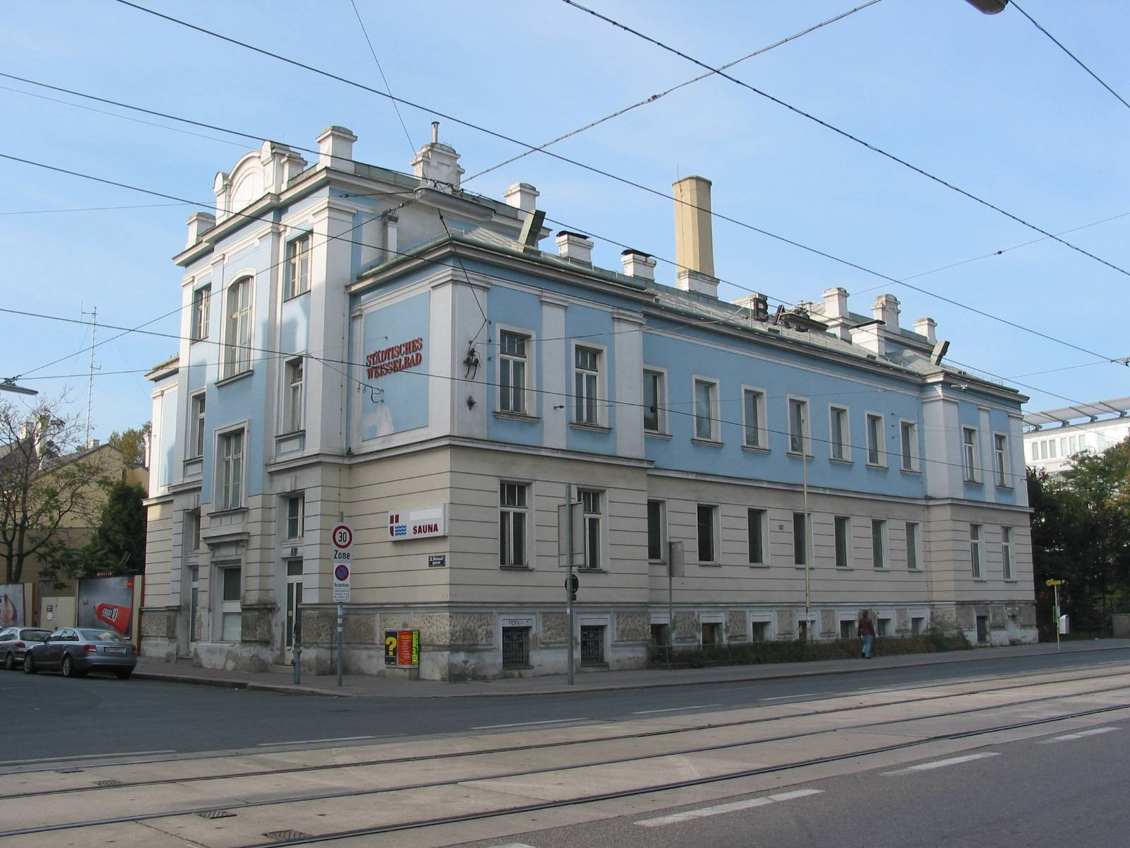 Das 2004 aufgelassene Weisselbad war eines der wenigen Tröpferlbäder, die in einem eigenen Gebäude untergebracht waren. Es wurde nach dem 1934 hingerichteten Schutzbundführer Georg Weissel benannt. Weisselbad, Vienna XXI, 2005-10-15 selfmade photo